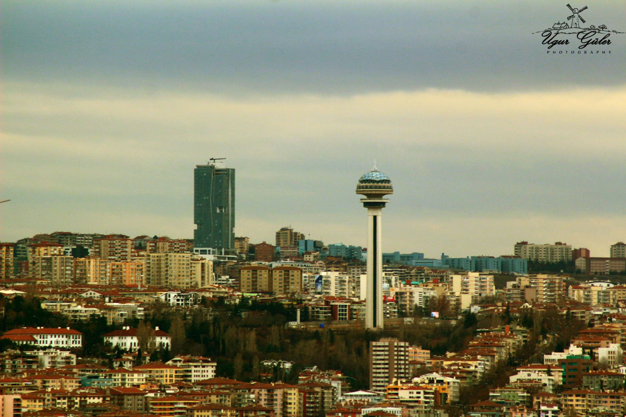 Atakule Alışveriş Merkezi